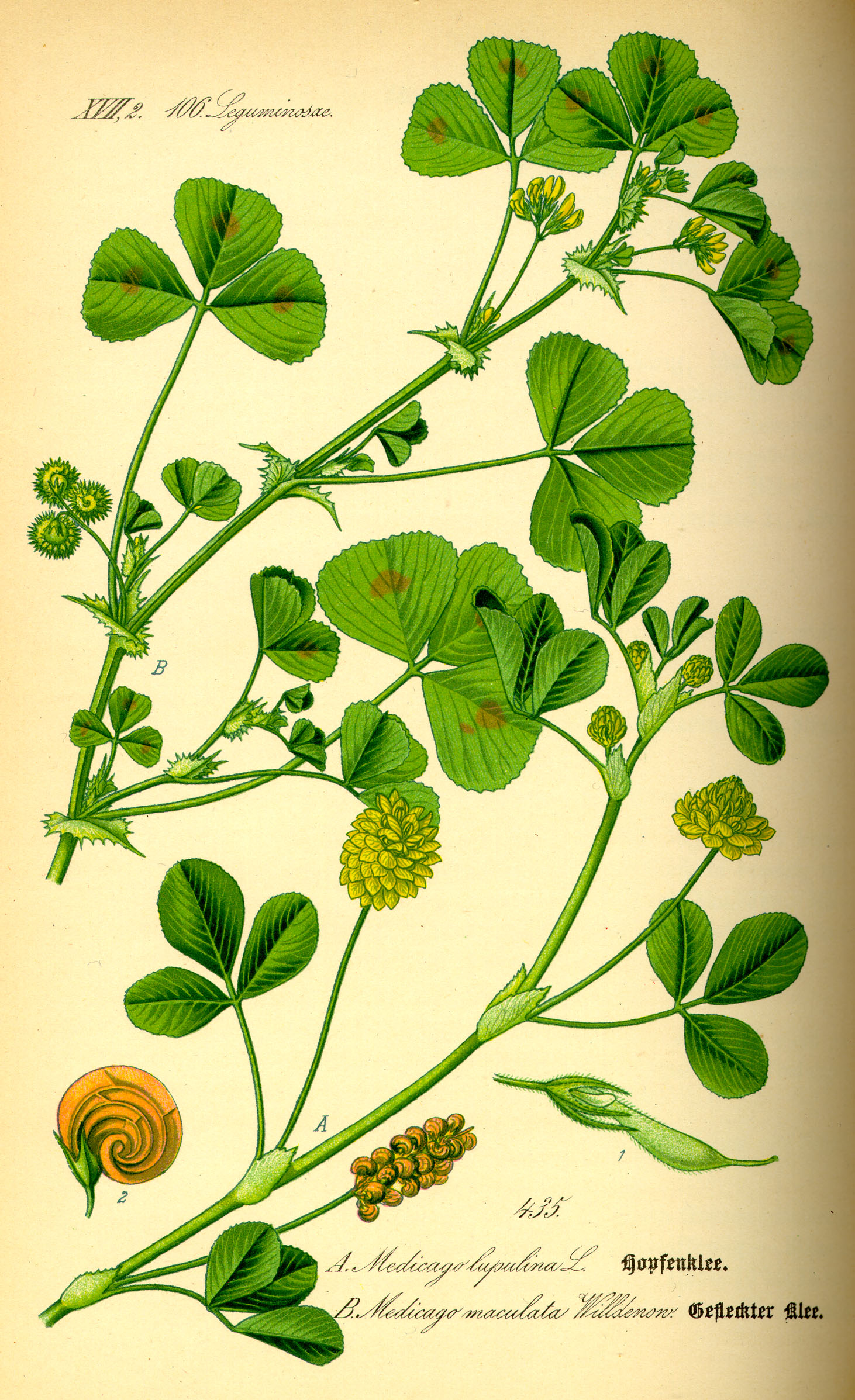 Name Medicago arabica Family Fabaceae